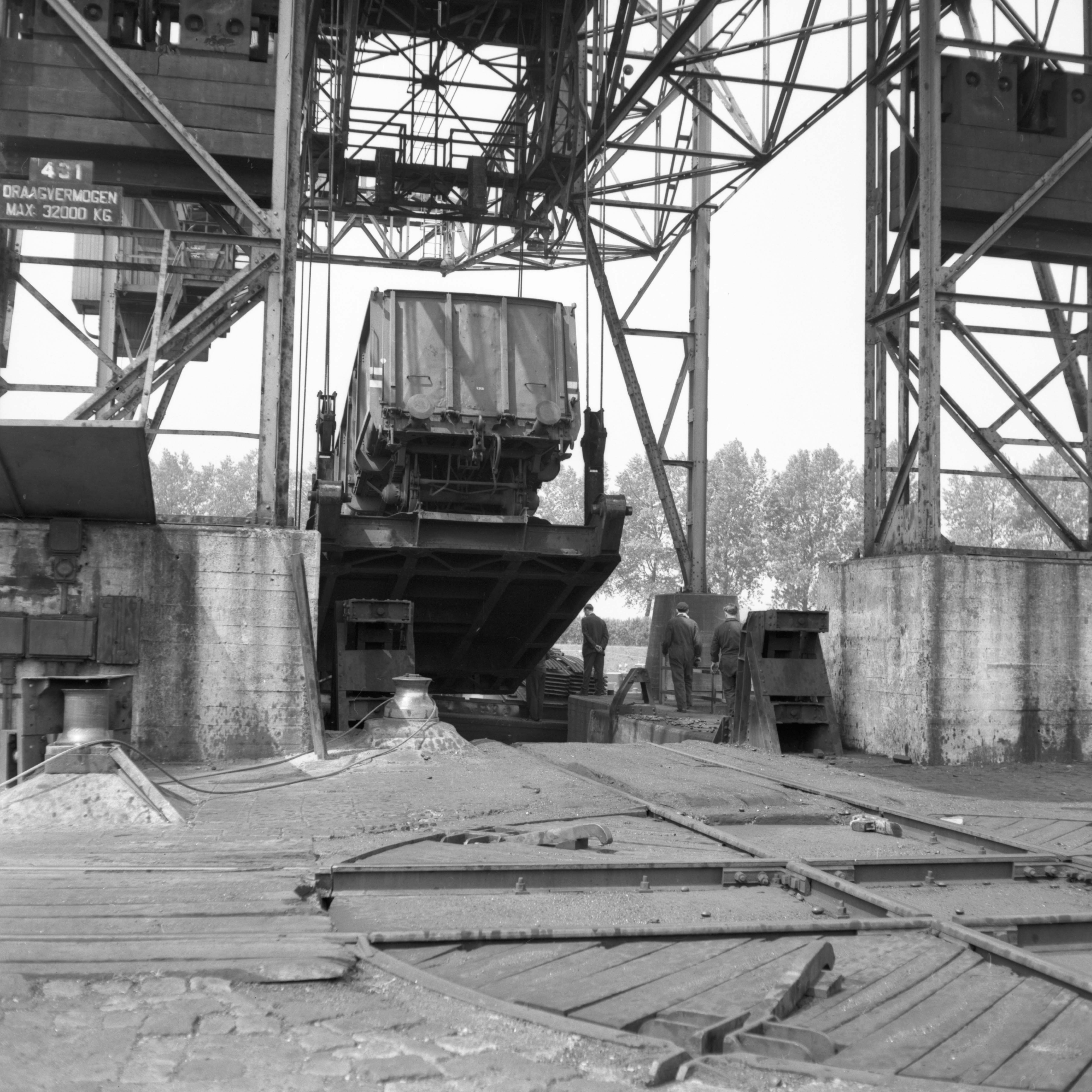 Afbeelding van een open goederenwagen in de kolentip (overslag van steenkolen van trein op schip) aan het Julianakanaal te Born. Op de voorgrond een wagondraaischijf.